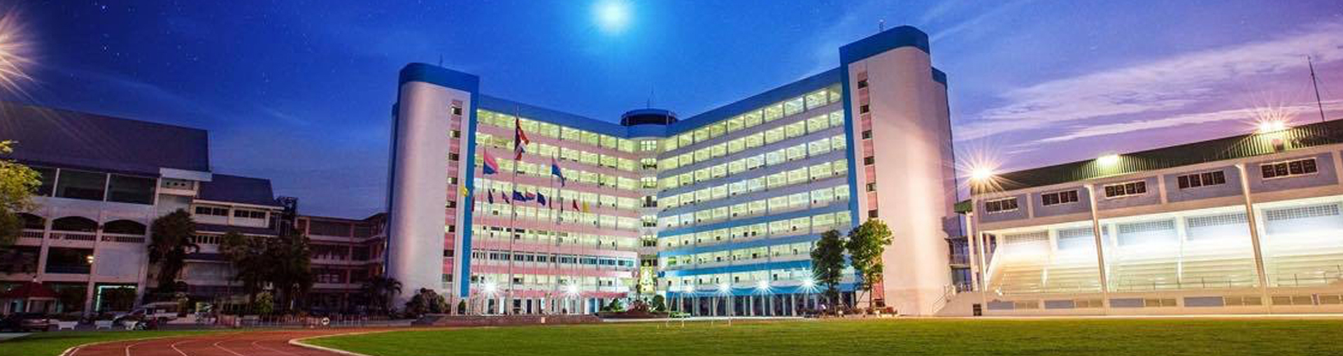 โรงเรียนสวนกุหลาบวิทยาลัย รังสิต